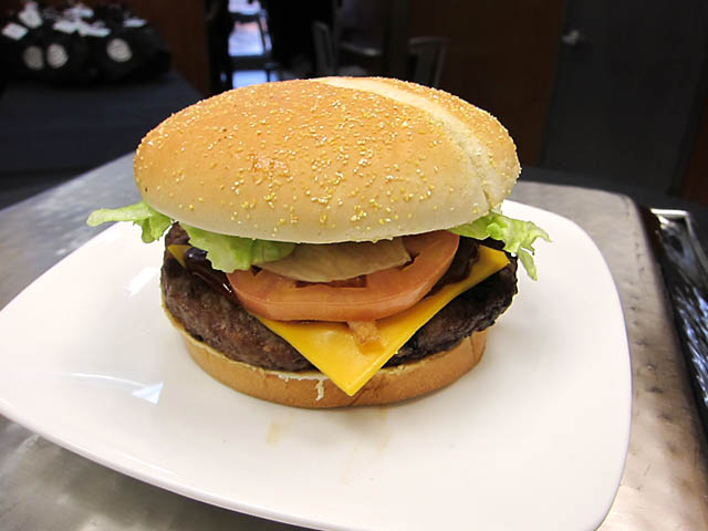 Burger King's Steakhouse XT hamburger